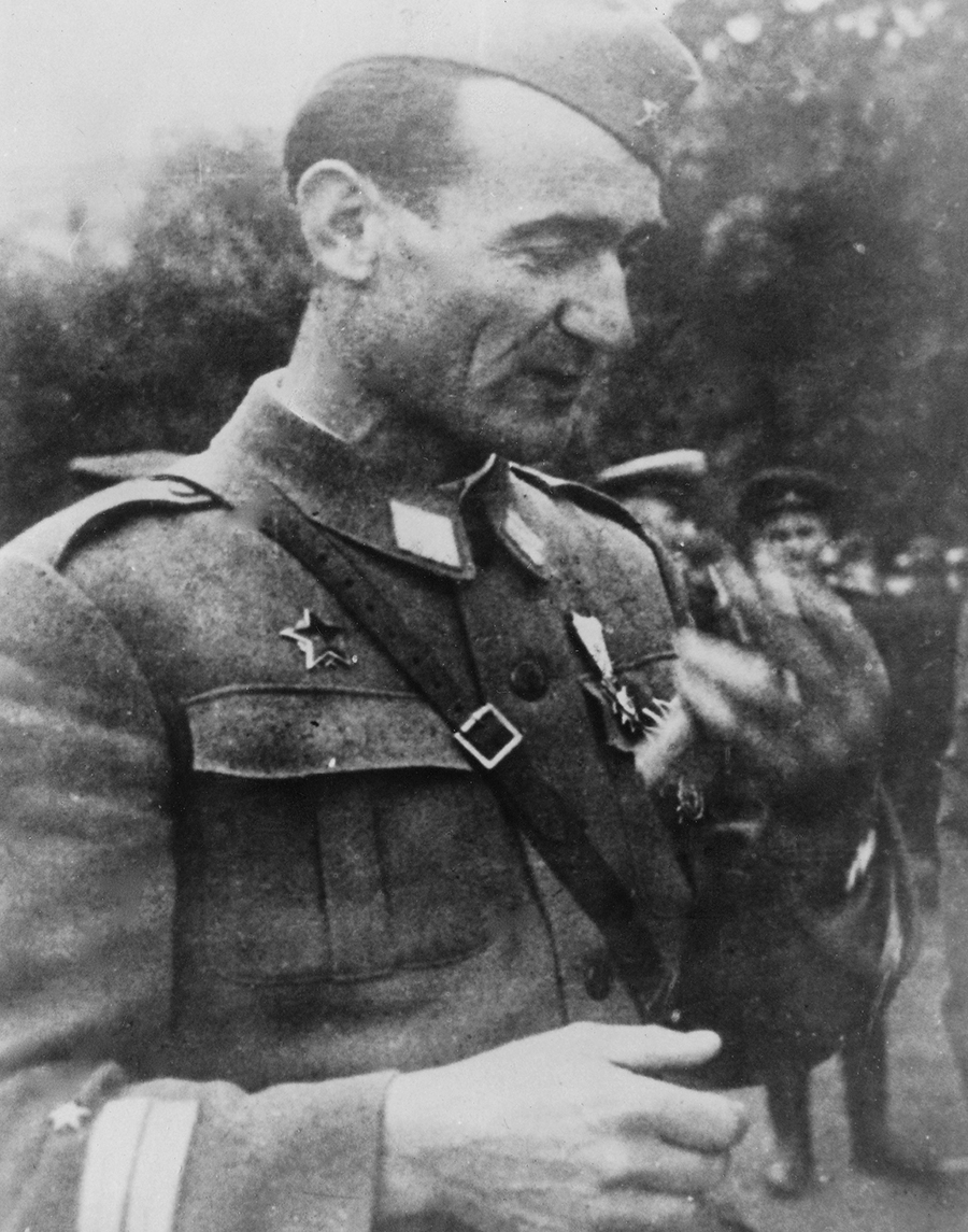 Srpski (latinica): Andrija Pejović, narodni heroj Jugoslavije